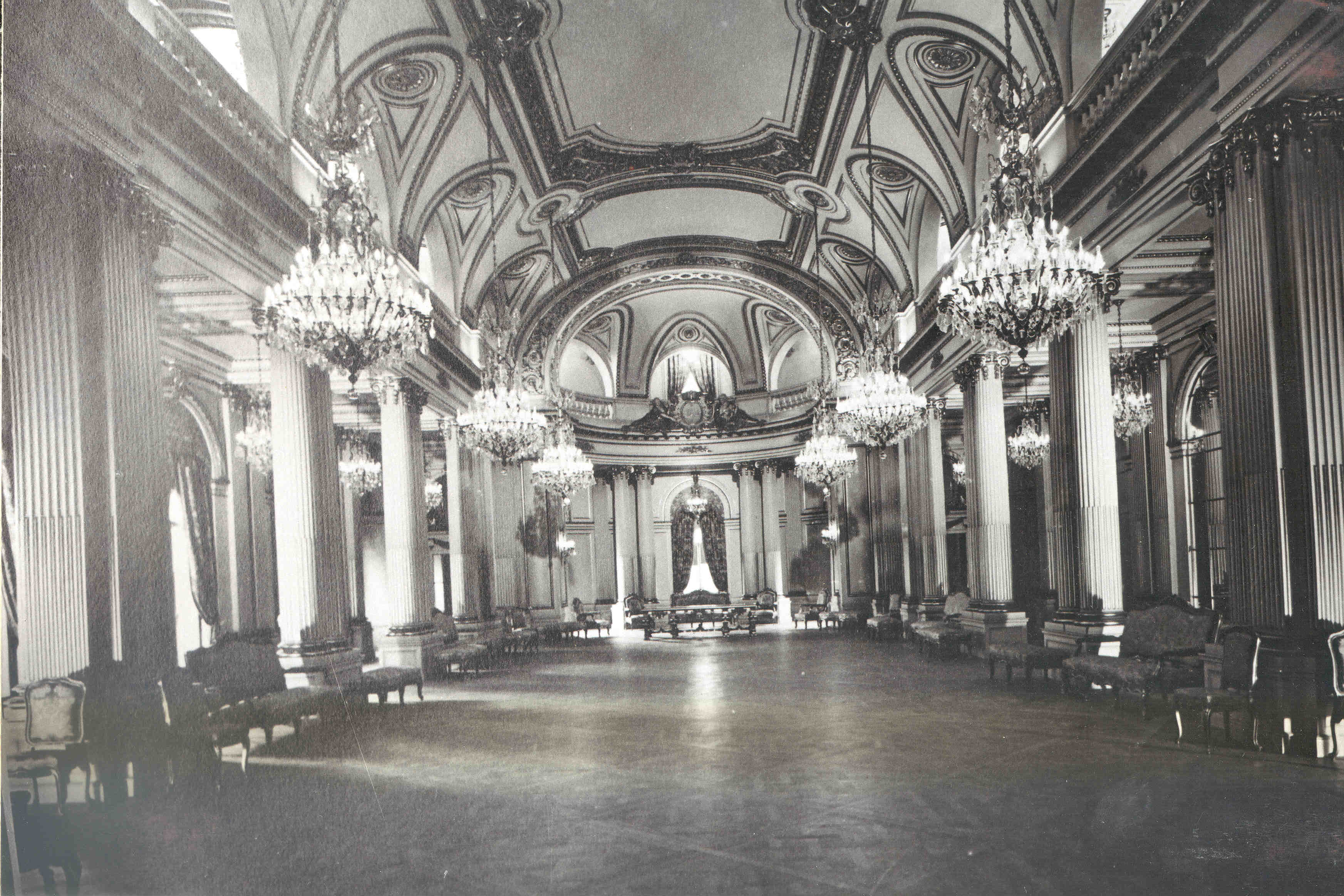 Imagen histórica del Palacio de la Legislatura de la Ciudad de Buenos Aires